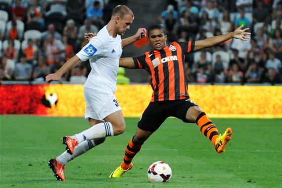 Євген Опанасенко під час матчу з донецькому Шахтарю, 19 серпня 2013 року